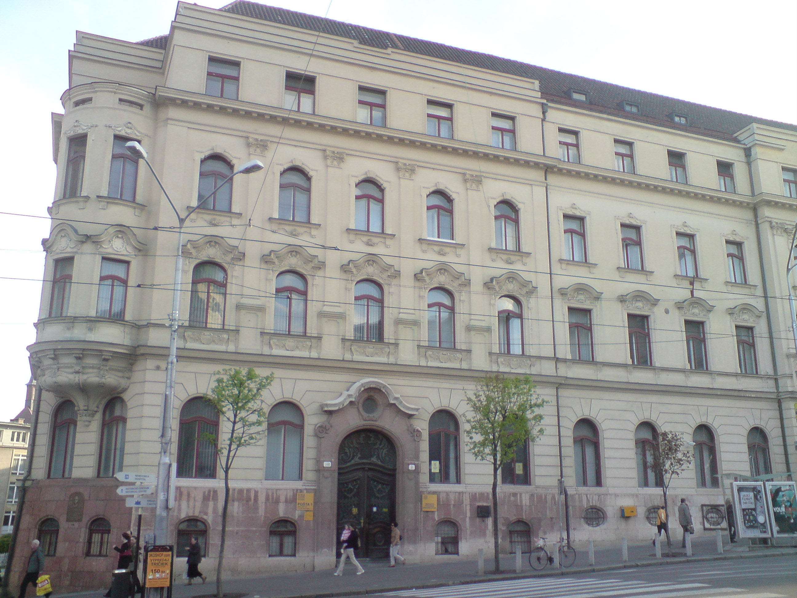 Poštový palác, Námestie SNP, Bratislava